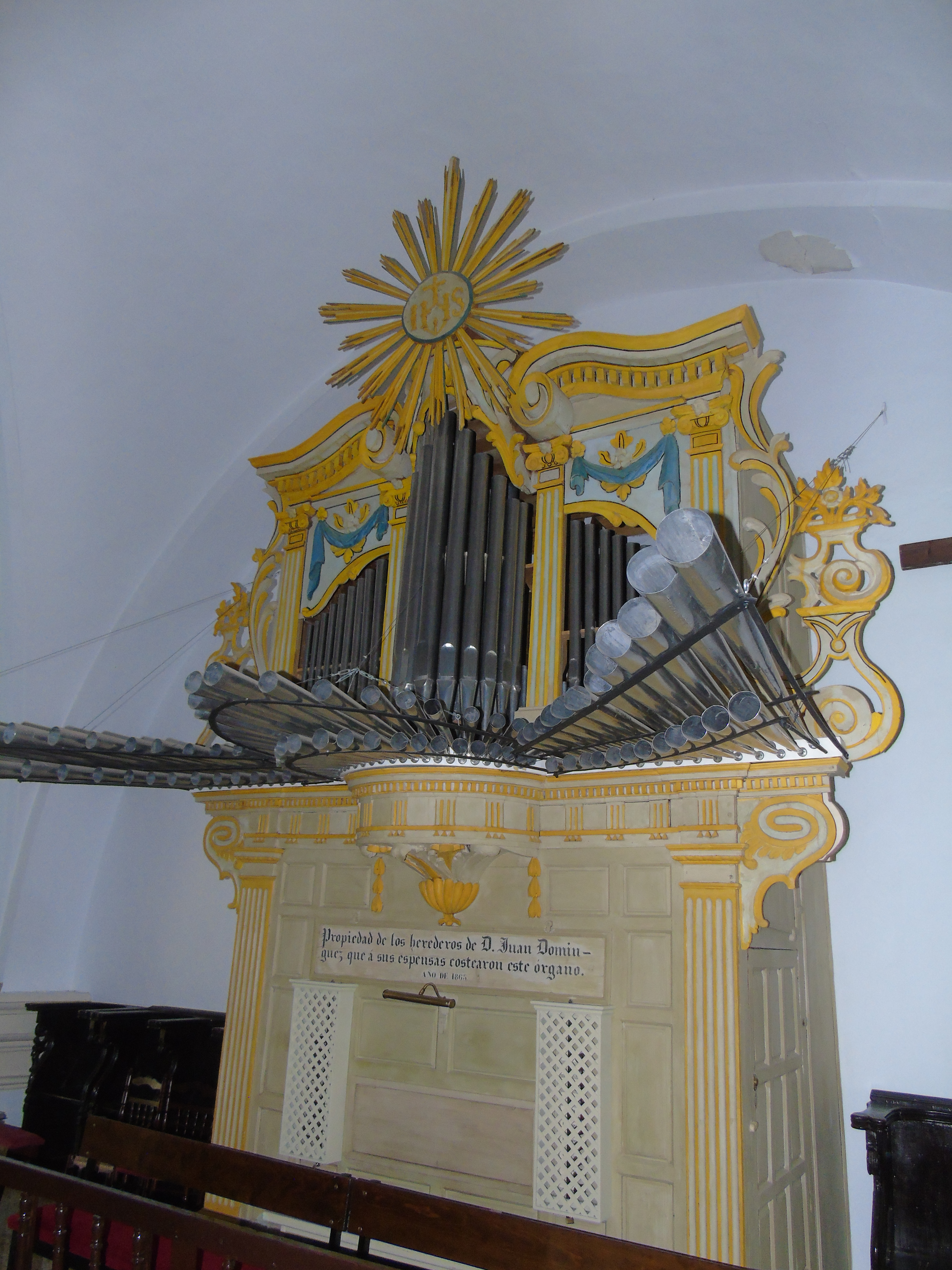 Órgano barroco de estilo pompalino procedente de Higuera la Real (Badajoz)